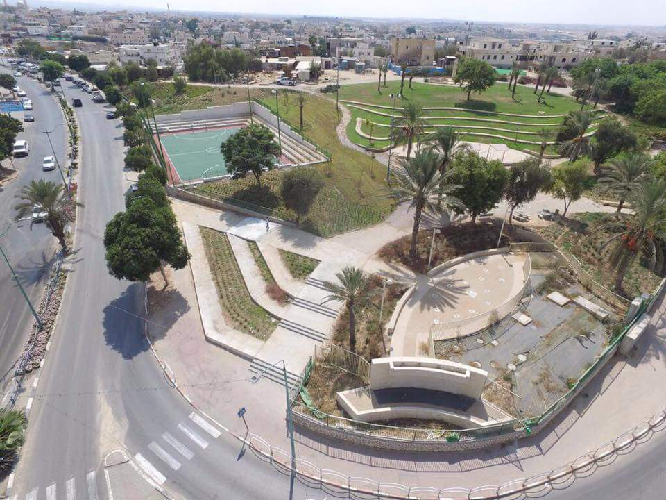 פארק משחקים מרכזי בעיר רהט